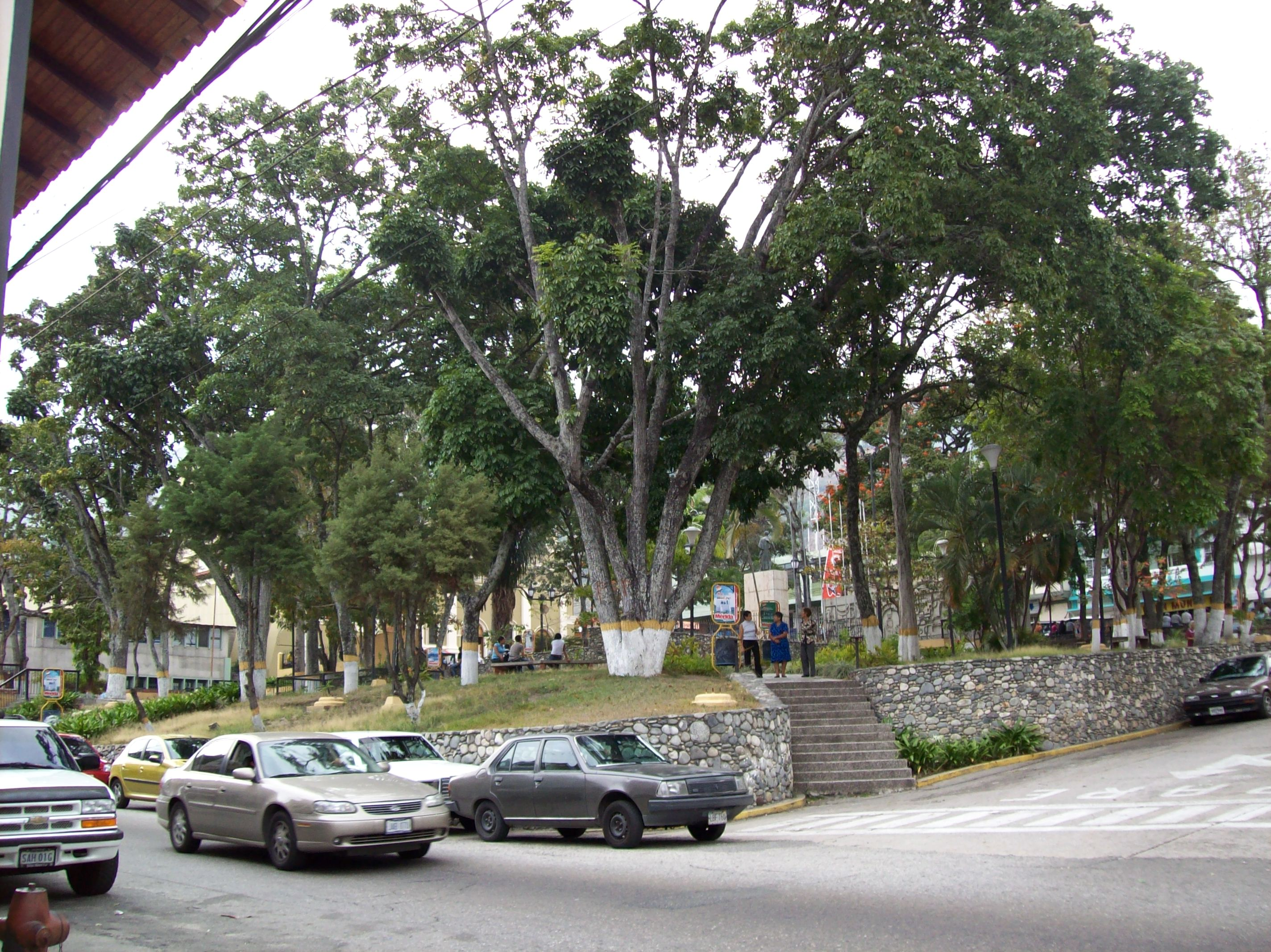 Vista de la Plaza Bolivar de Tovar